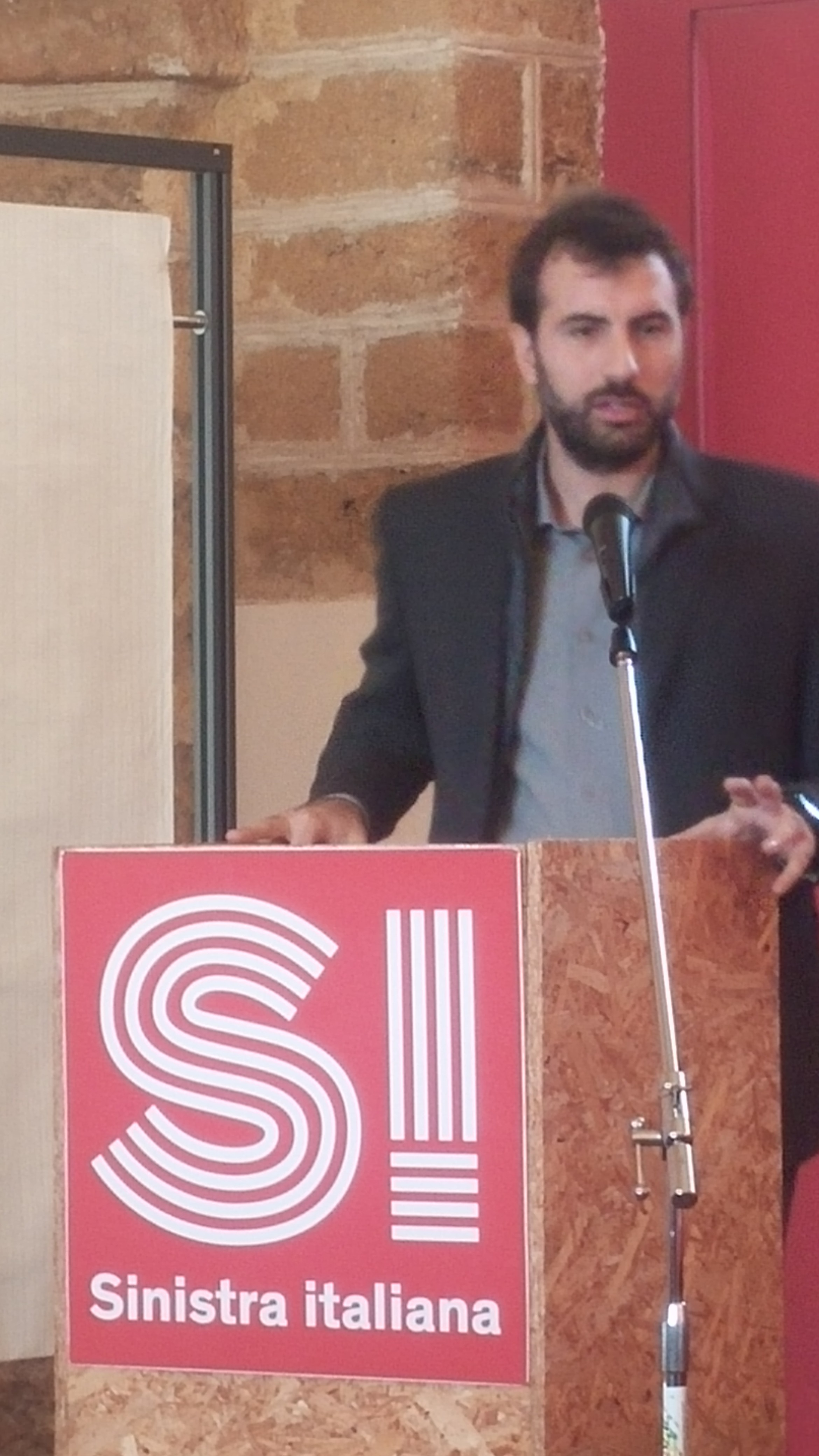 Erasmo Palazzotto apre il Primo Congresso Provinciale di Sinistra Italiana a Palermo